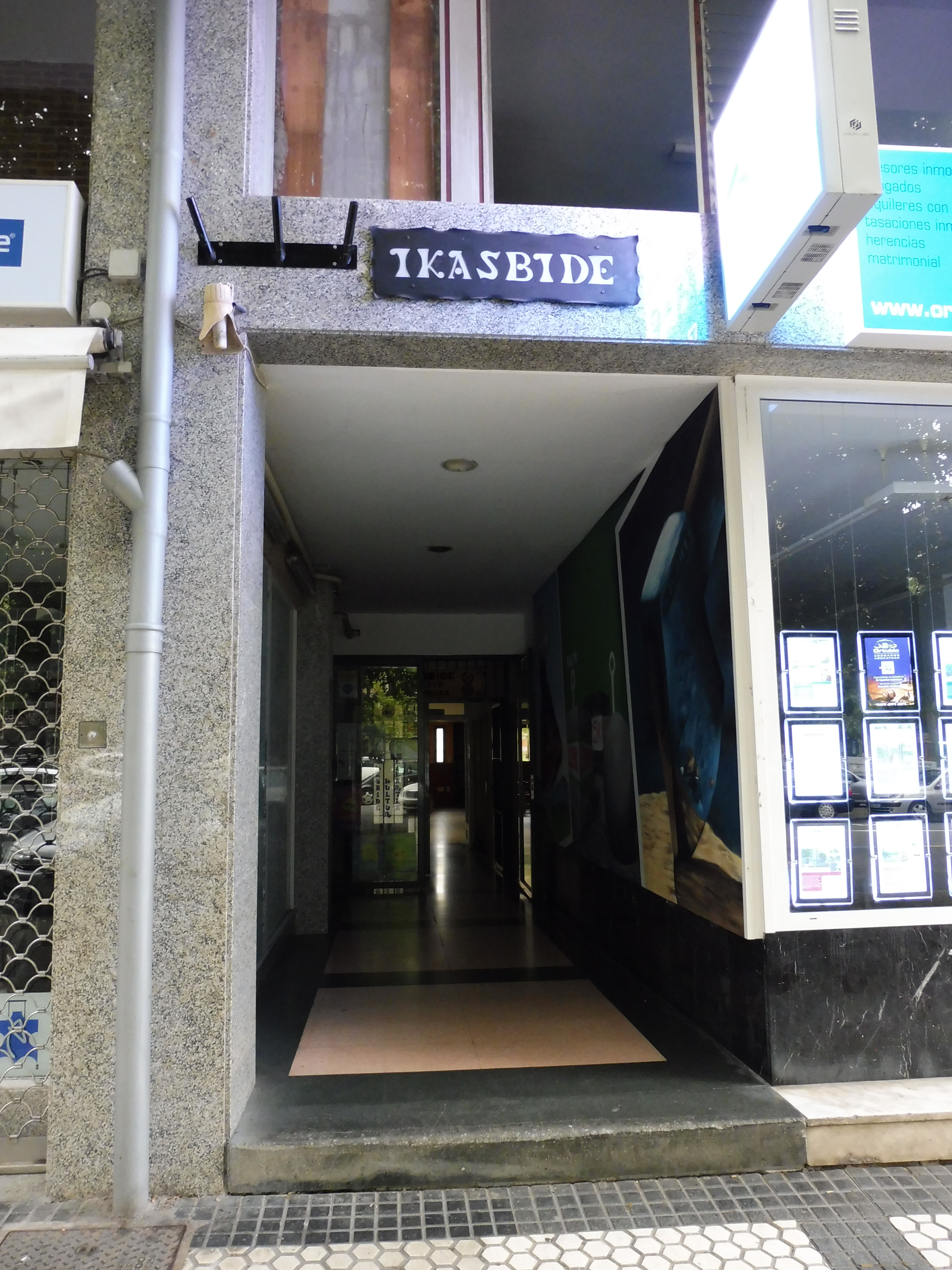 Ikasbide Kultur Elkartea 1968an Donostiako Amara Berri auzoan sortutako kultur elkartea da. Argazki hau Amarauna Bildumarako egin da. Isabel II.a Etorb., 15, 20011 Donostia, Gipuzkoa